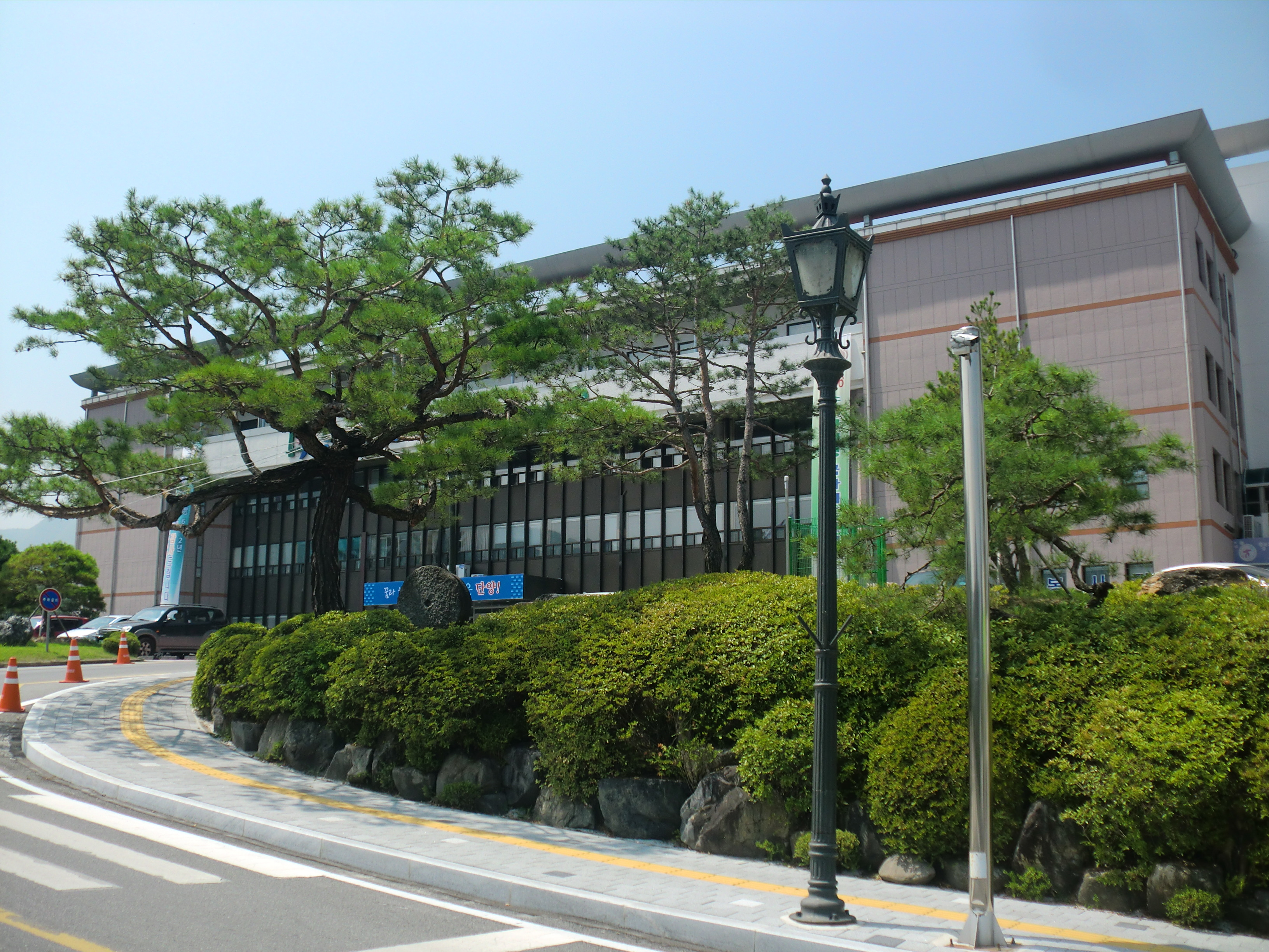 충청북도 단양군에 있는 단양군청